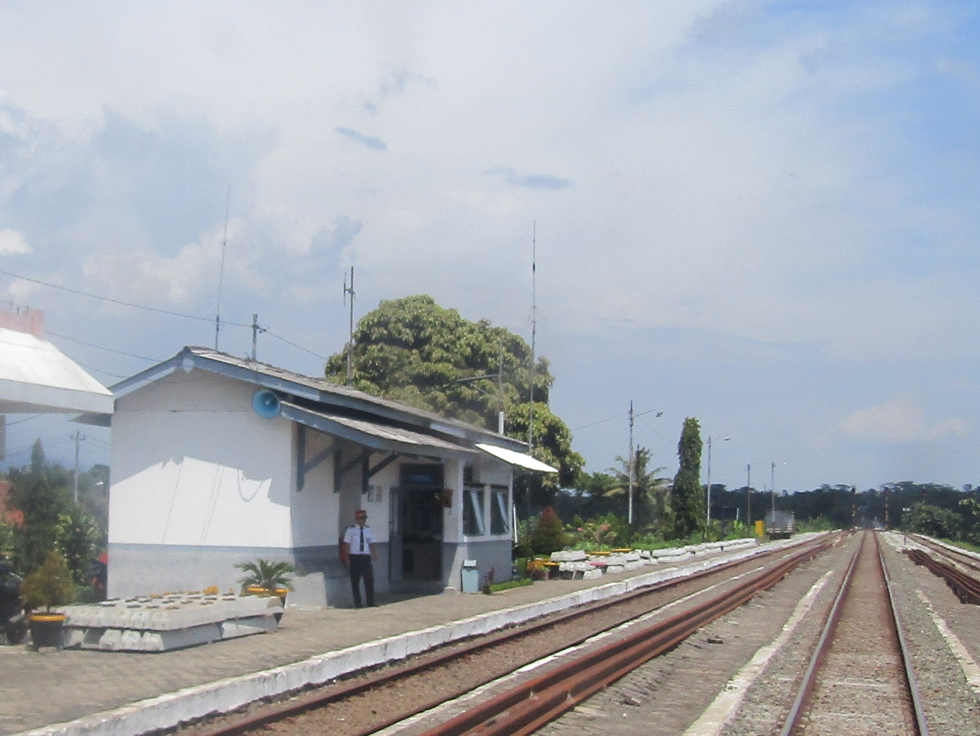 Bangunan Stasiun Sikampuh, 2020